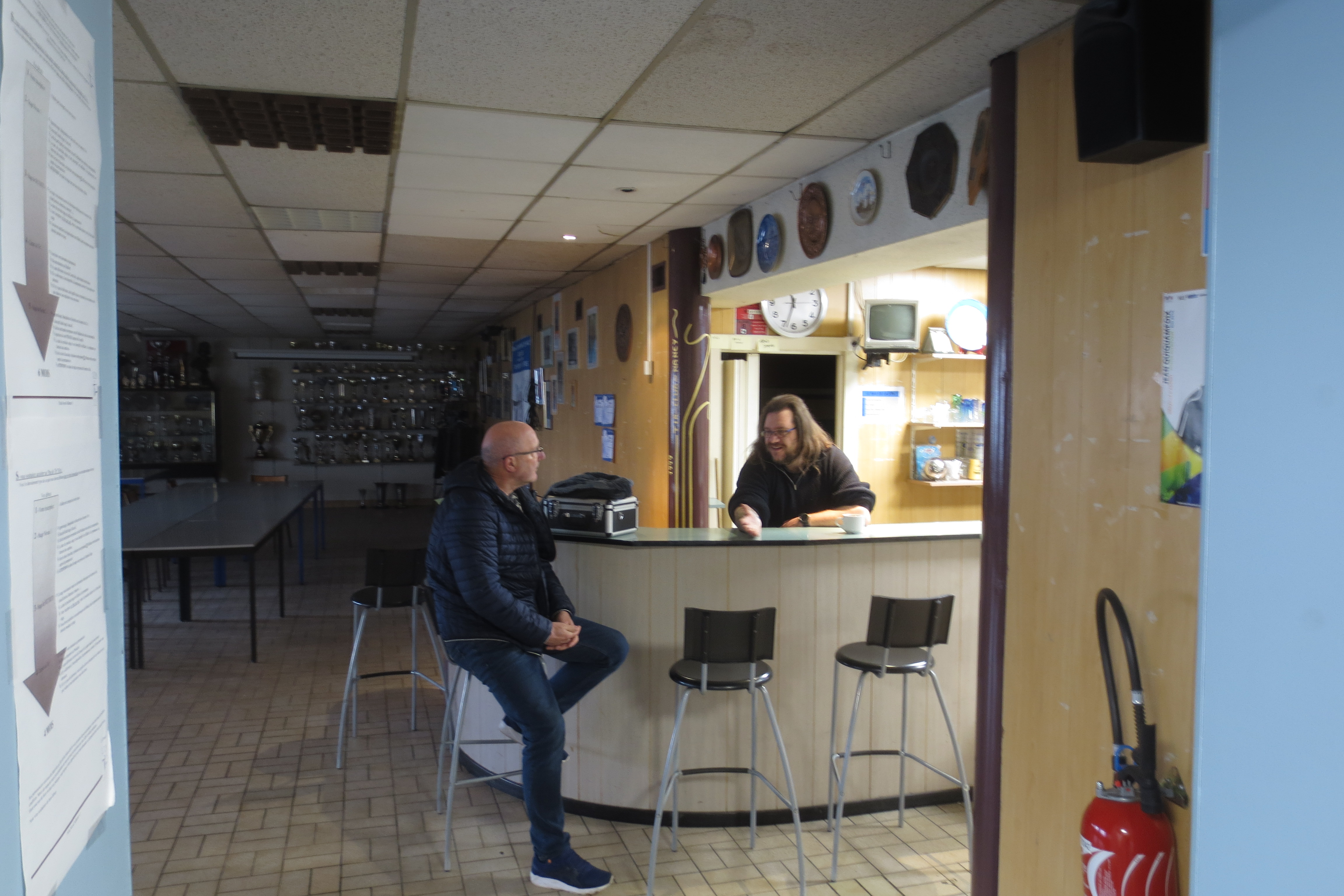 Société de tir de Nancy - Le Président HIMBER assurant la permanence